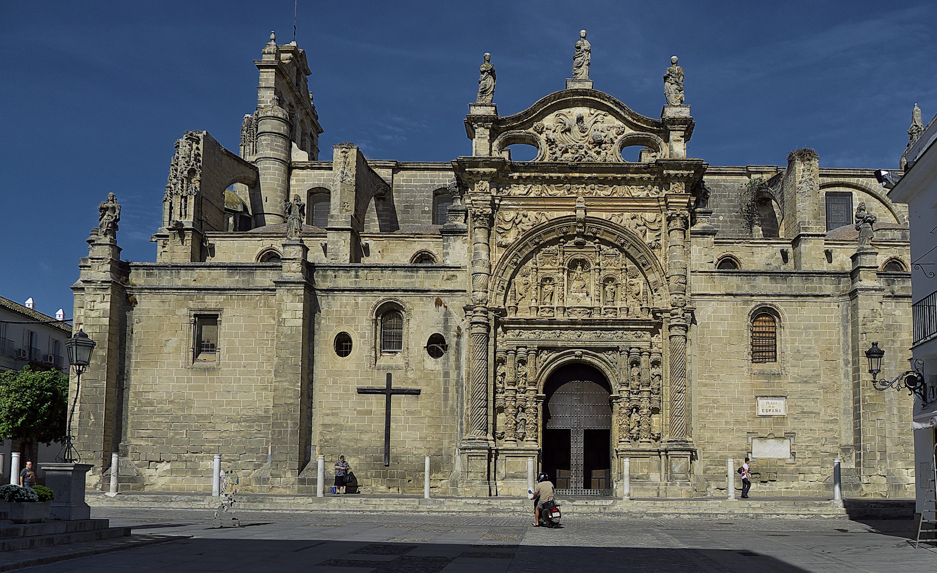 Fachada meridional de la Iglesia Mayor Prioral (El Puerto de Santa María).